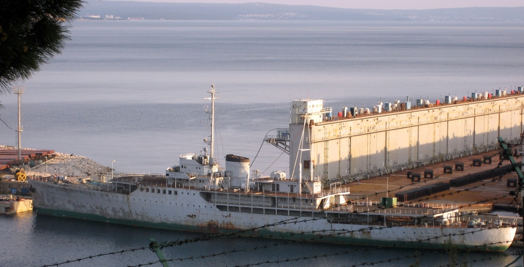 brodogradilište Viktor Lenac i bivši Titov brod Galeb